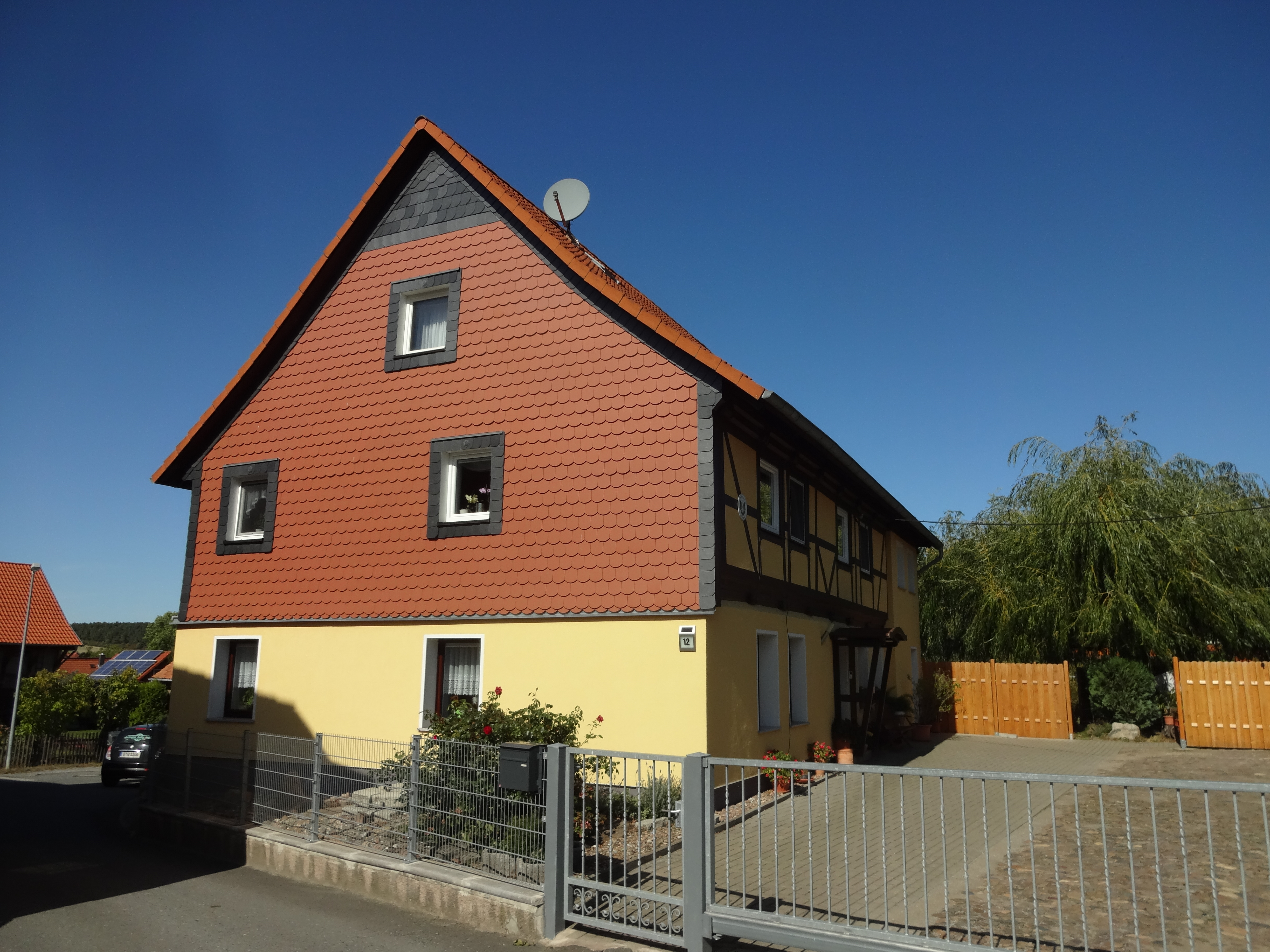 ehemals denkmalgeschütztes Bauernhaus im Mühlenwinkel 12 in Drübeck